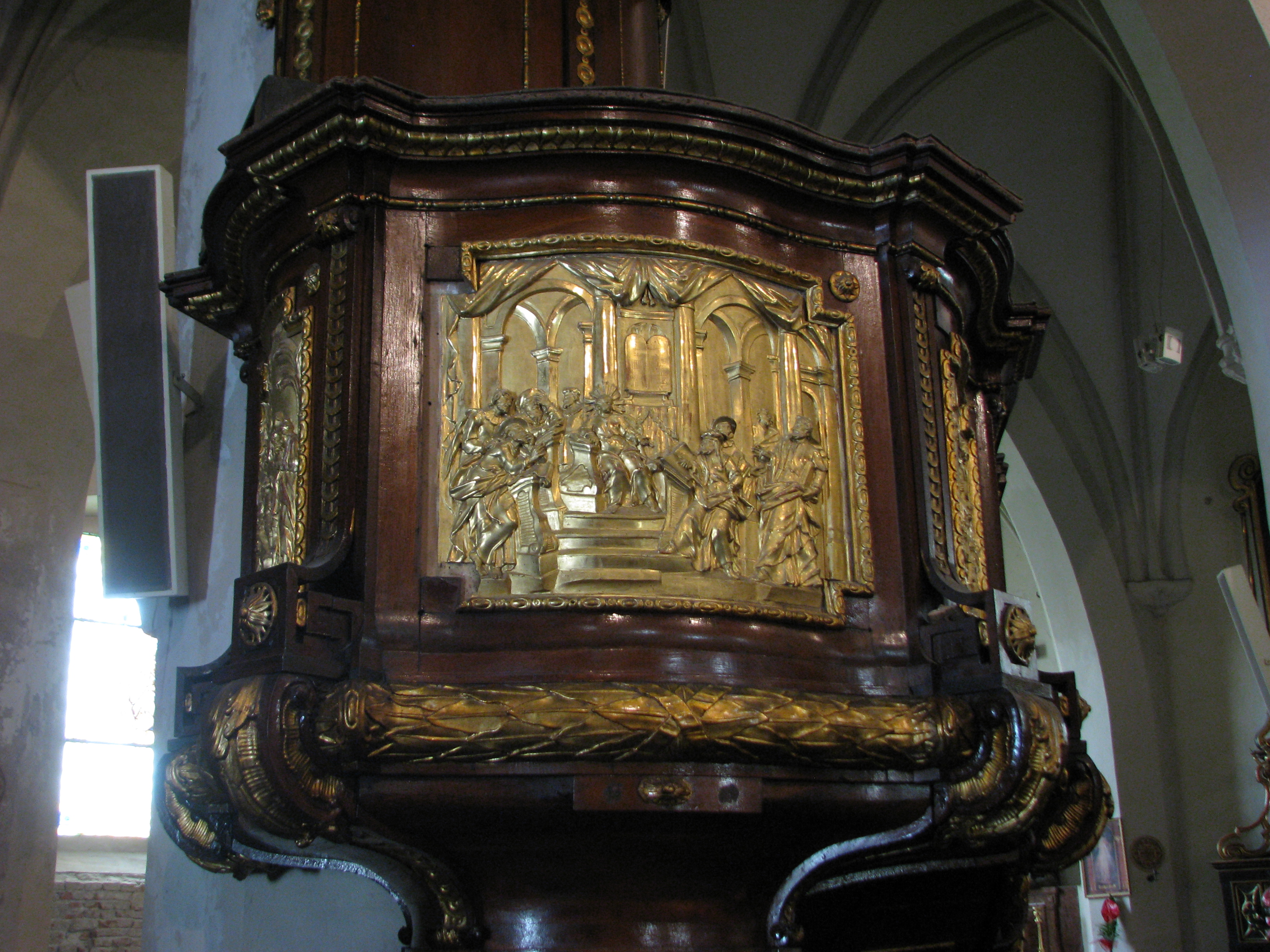 Die barocke Kanzel des Nikolaus-Doms in Tyrnau This medium shows the protected monument with the number 207-1125/1 in the Slovak Republic.